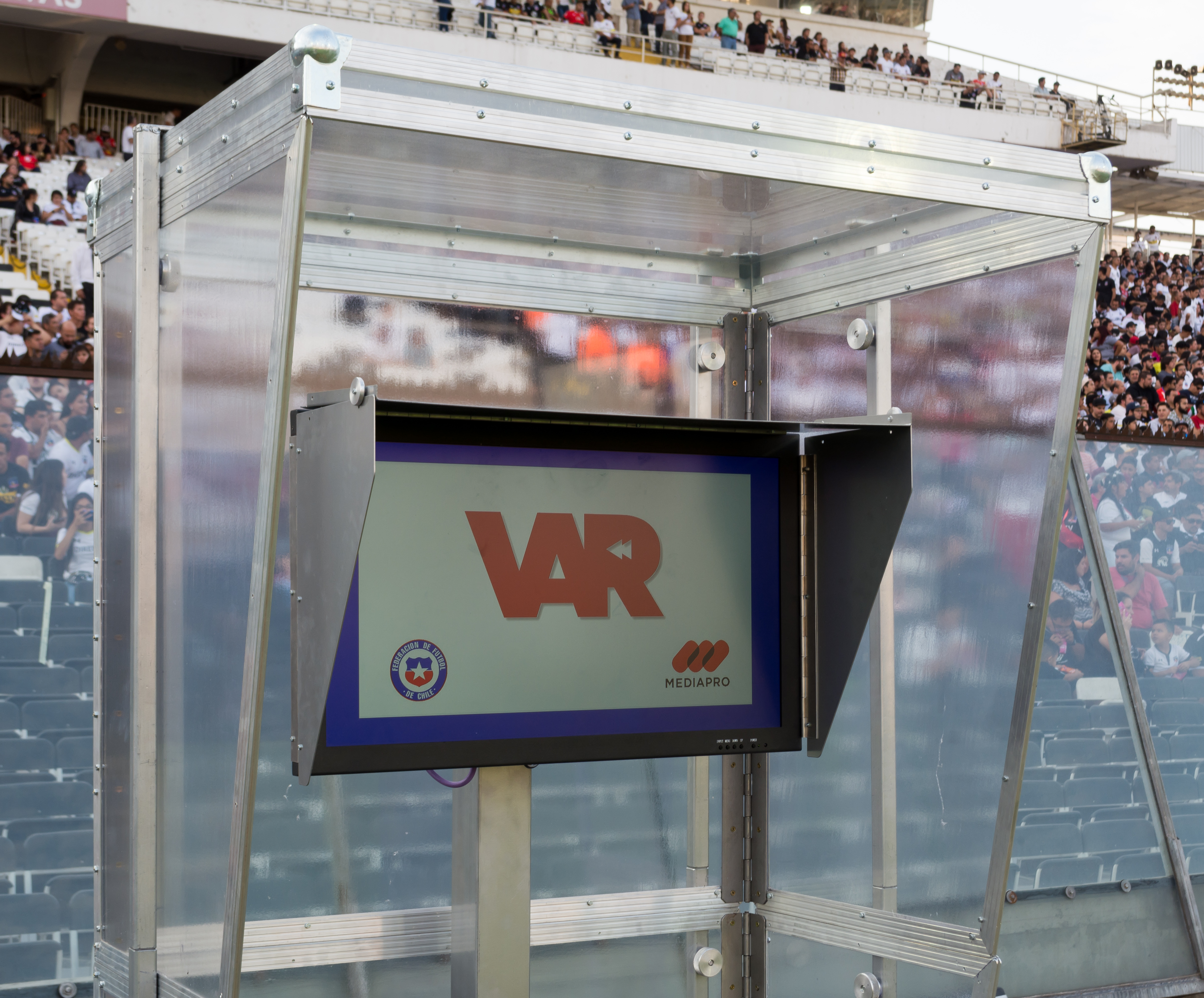 Colo-Colo v Palestino, Estadio Monumental, Macul, Santiago, Región Metropolitana, Chile